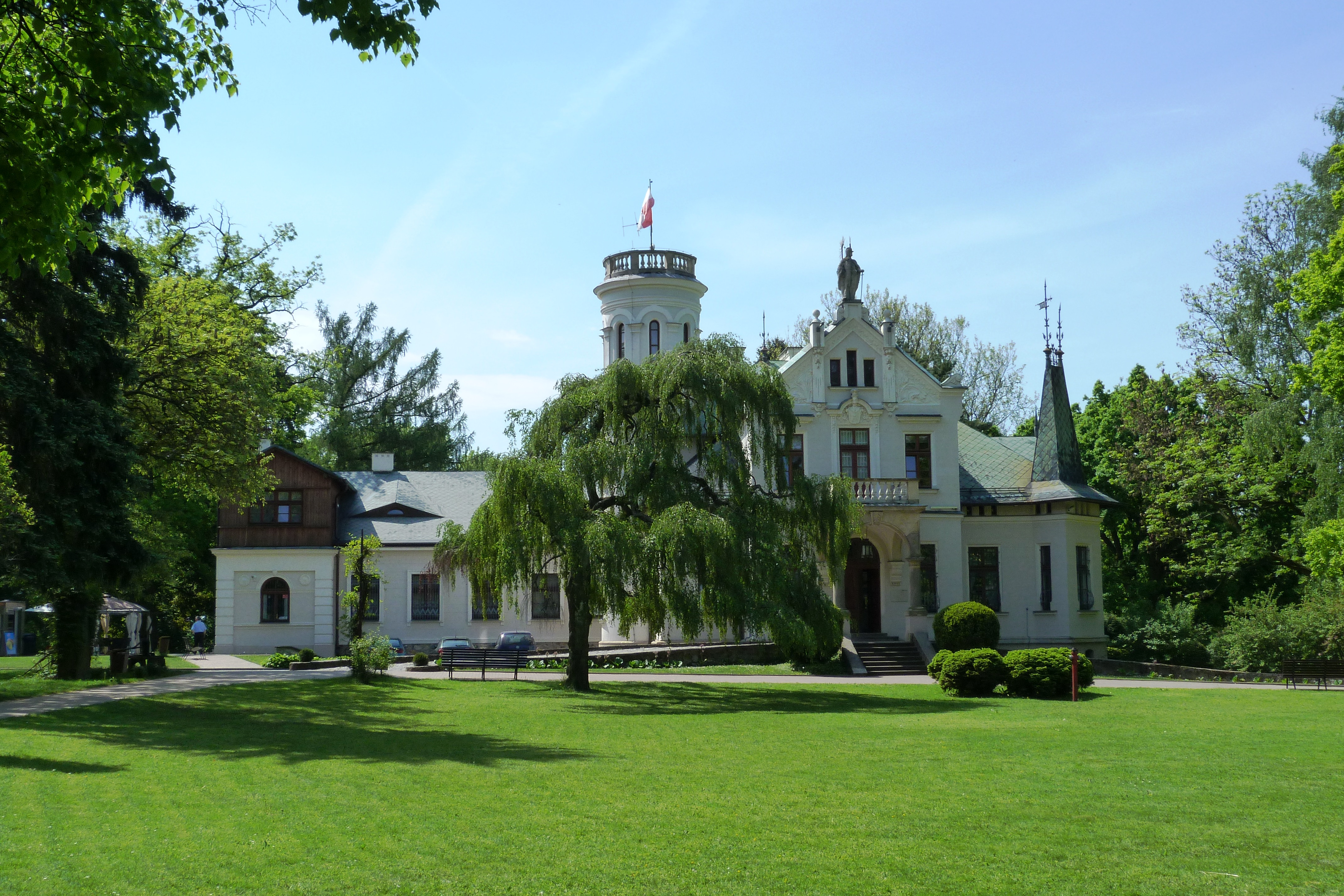 Oblęgorek - zespół pałacowy